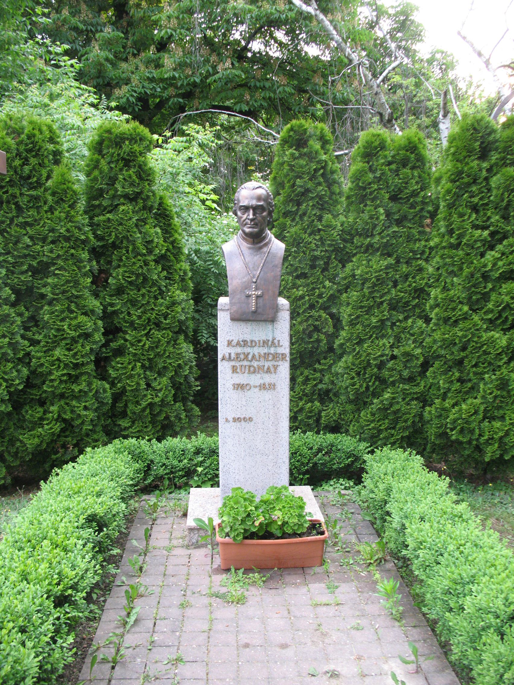 Vágmosóc